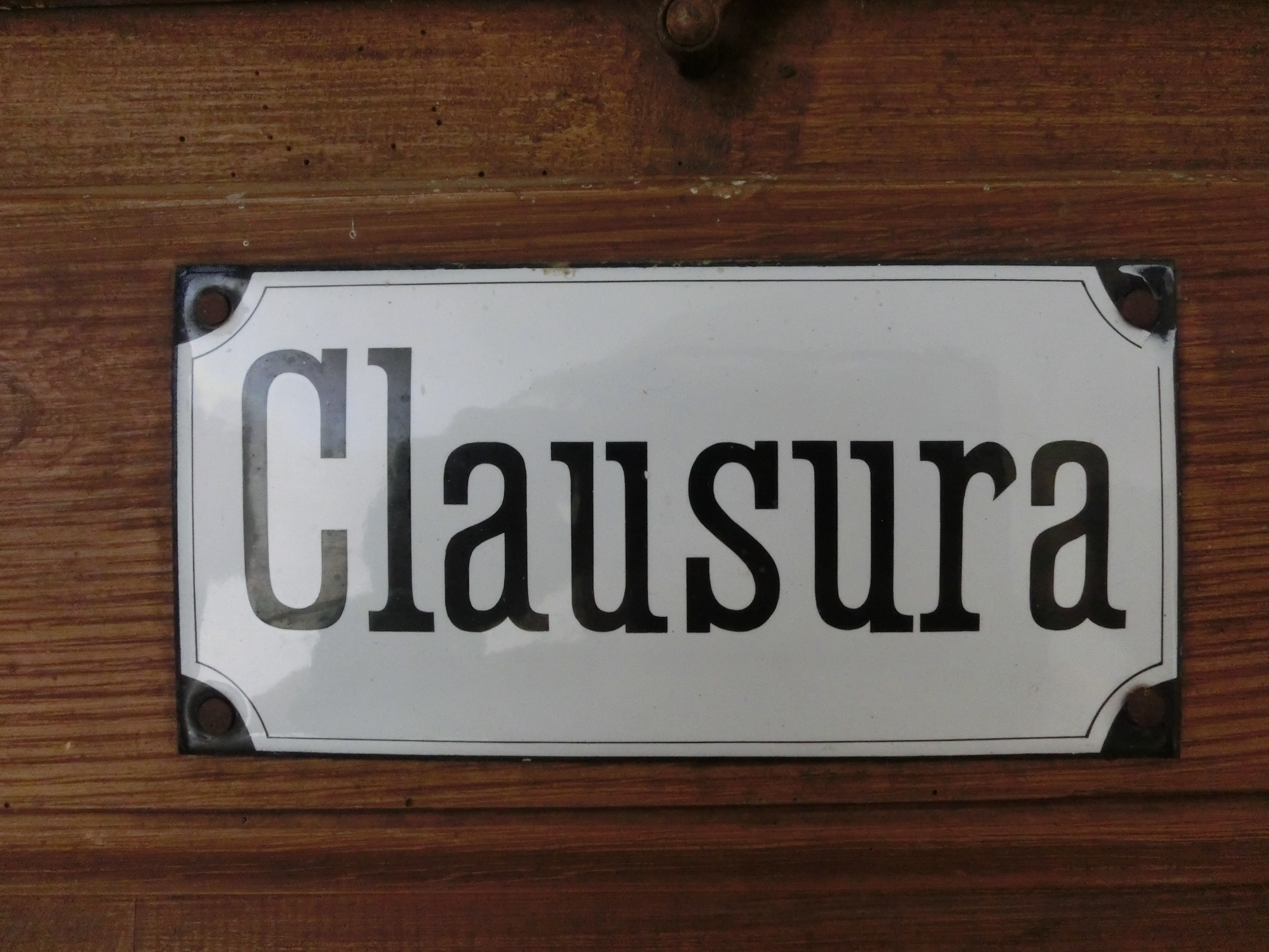 Deutschland - Baden-Württemberg - Landkreis Sigmaringen - Ostrach-Habsthal: Kloster, Schild "Clausura"